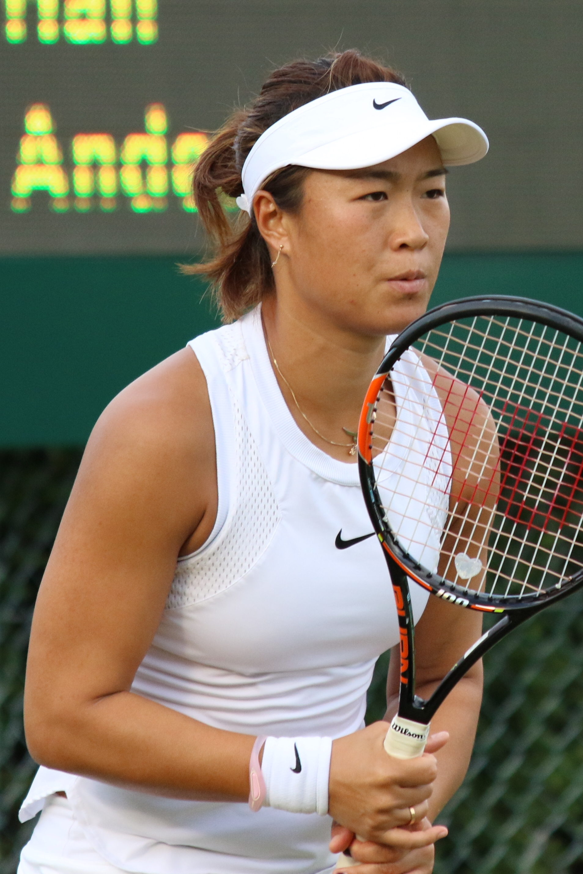 Han WMQ16 (12)